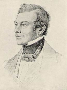 Portrait Ignaz von Olfers